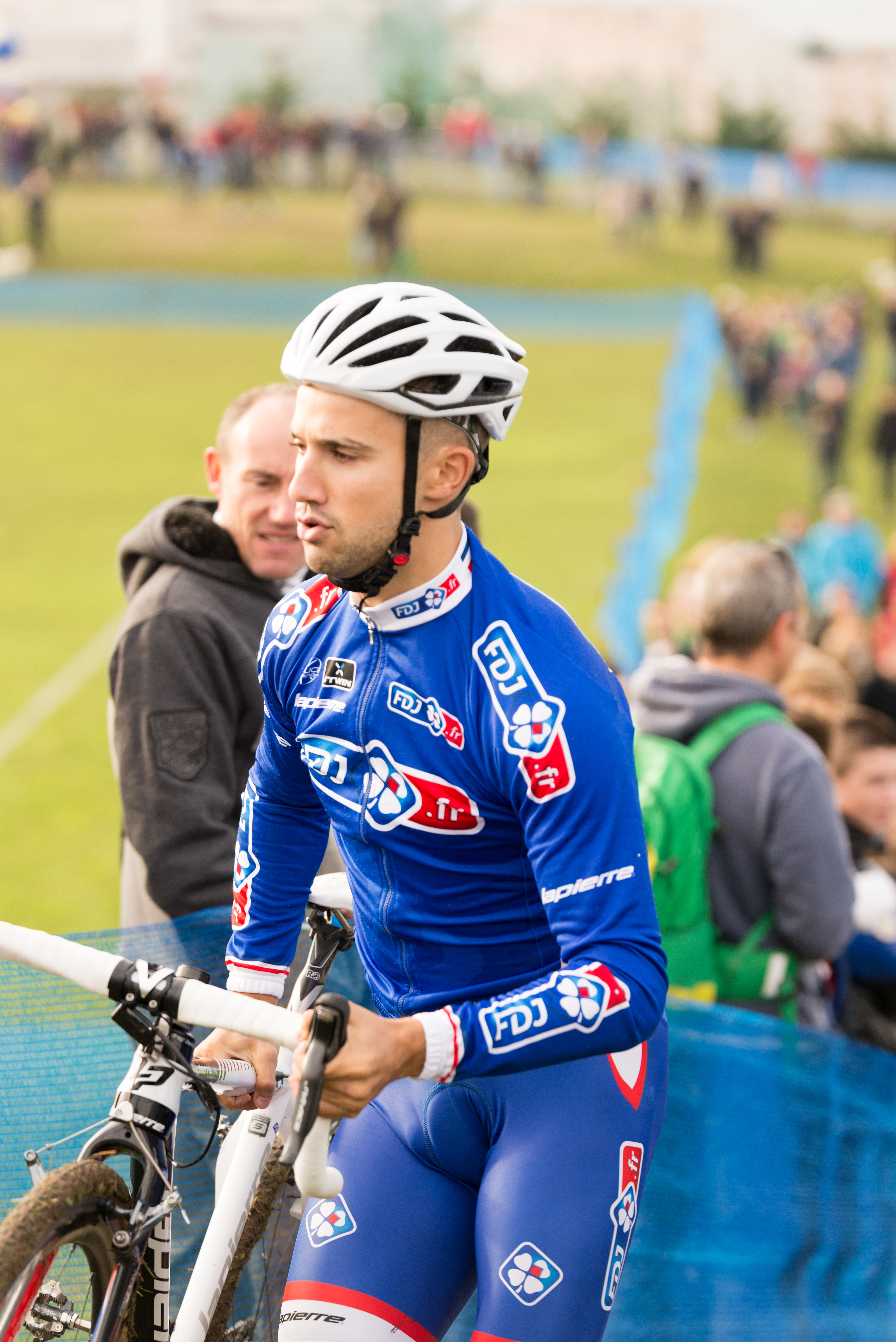 Nacer Bouhanni lors du 27ème cyclo-cross international de Dijon (Côte d'Or, France).